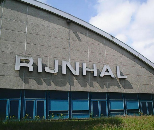 rijnhal